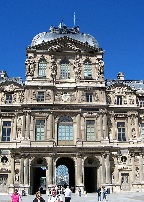 Parigi - Palais du Louvre (Pavillon de l'Horloge)